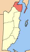 Corozal district, Belize